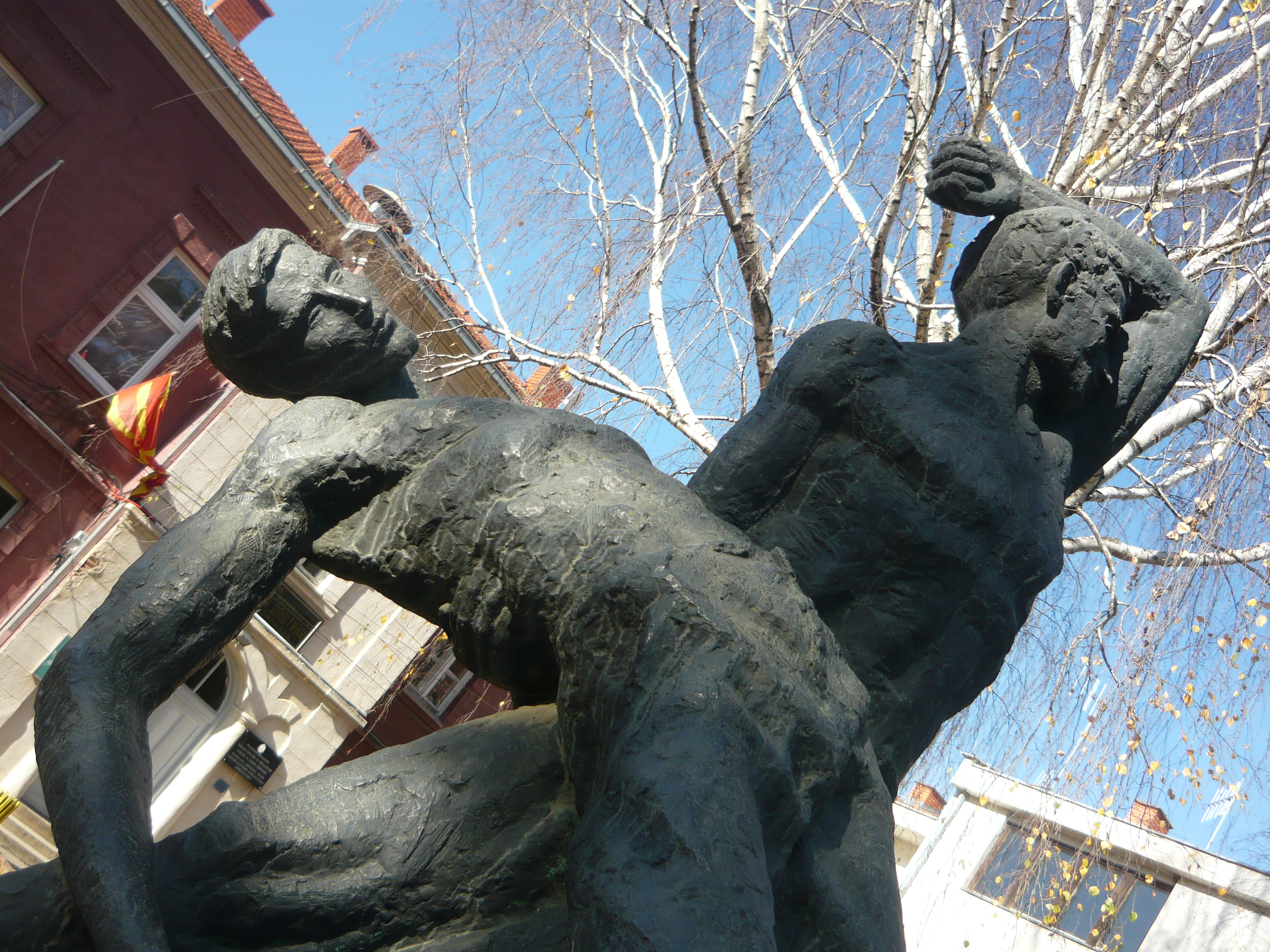 Споменик на паднатите борци од НОБ во Крива Паланка